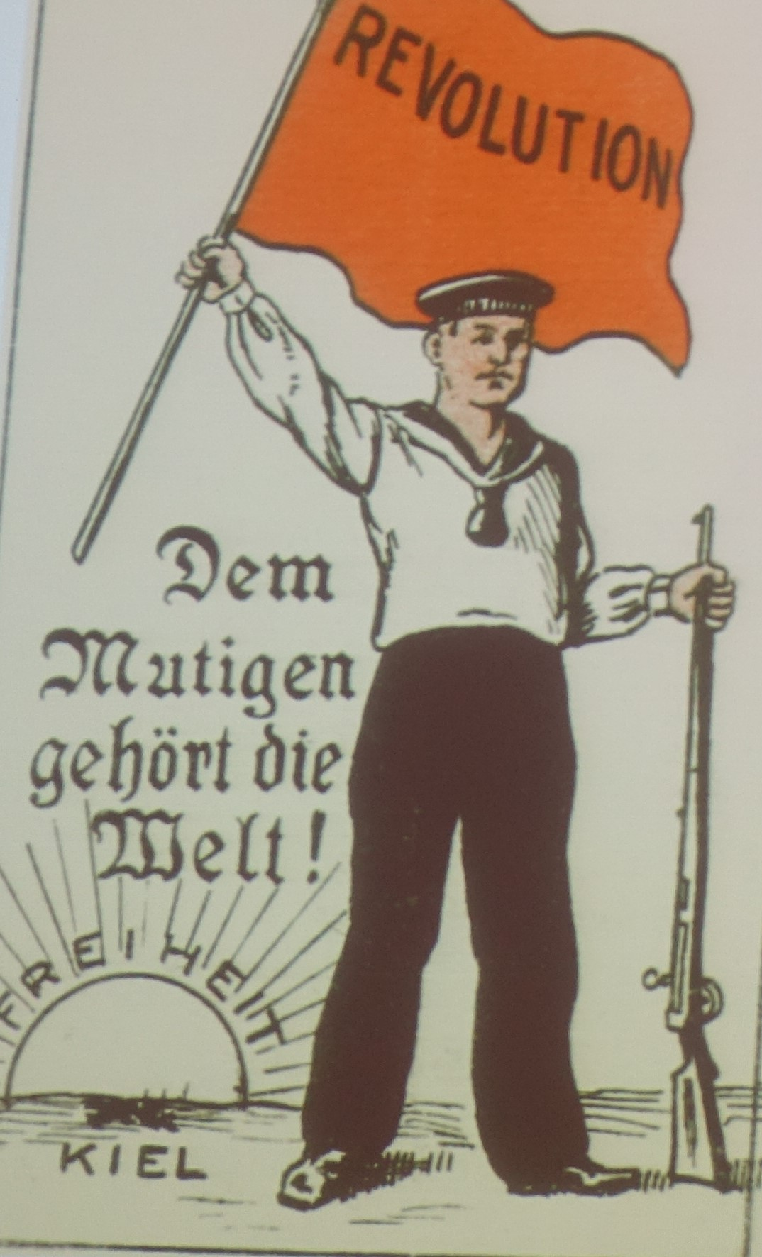 Revolutionspostkarte, anonym,1918 nach Angaben im Flyer zum Matrosen-Aufstand in Kiel